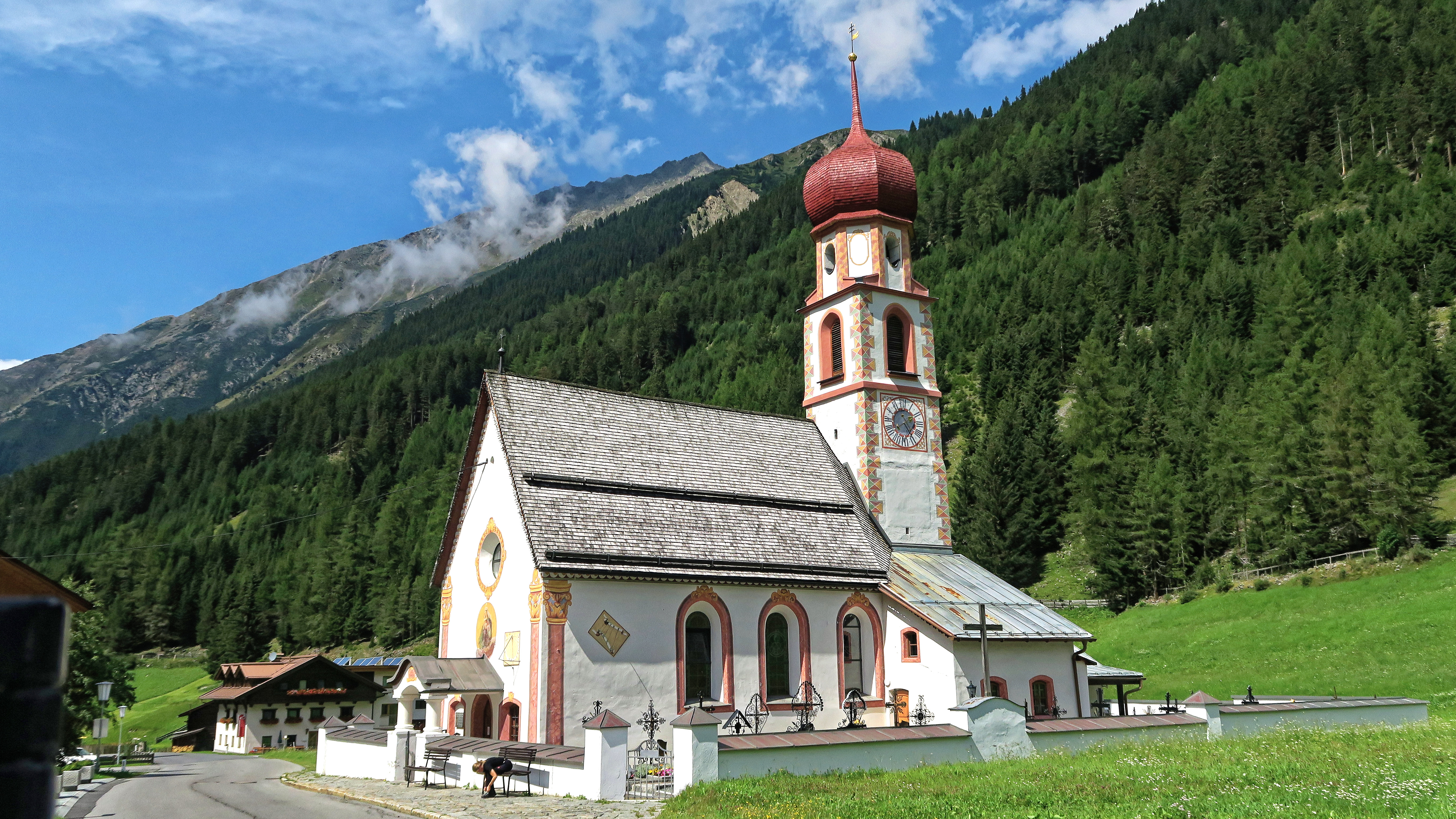 Ansicht der Kirche von außen und Gebirge im Hintergrund